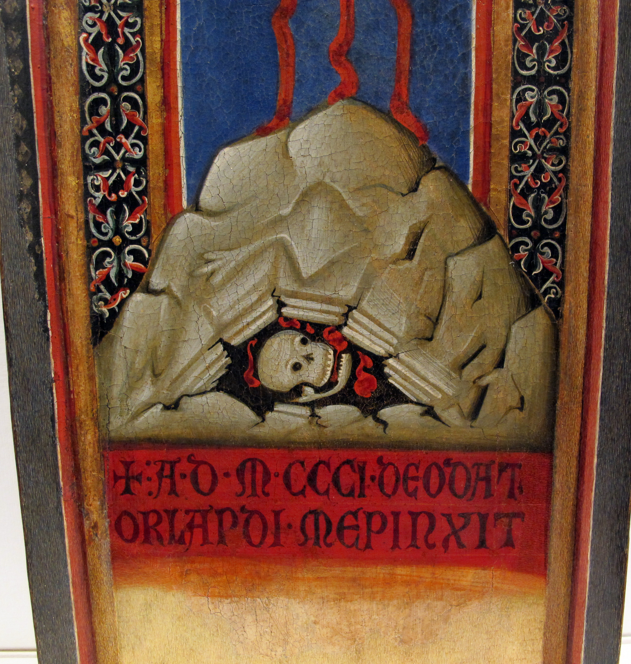 Museo di Santa Chiara (San Miniato)